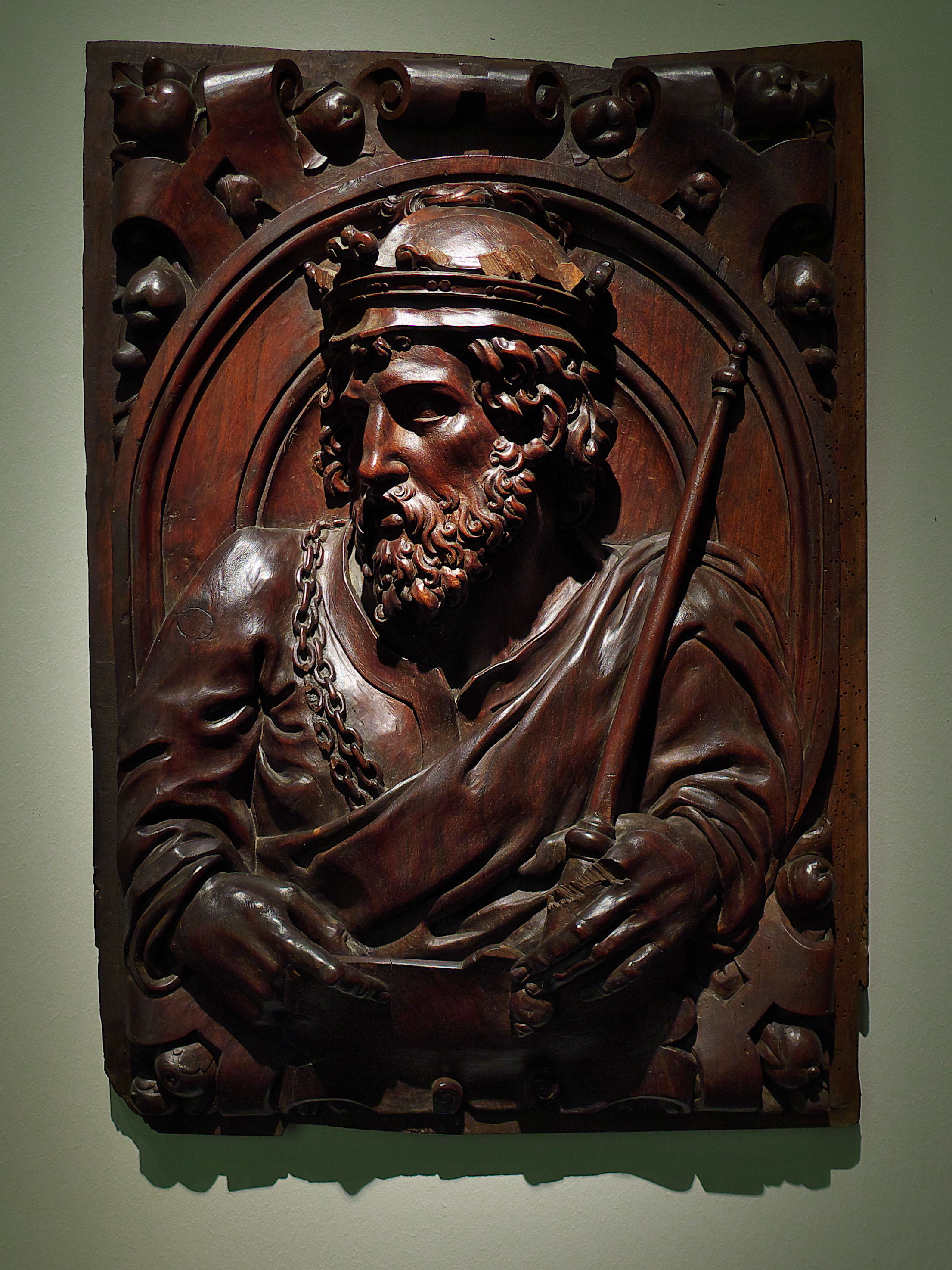 Museo de la Catedral de Astorga. Tomás Mitata, Nicolás de Colonia, Pedro del Camino y Roberto Memorancy tallan la soberbia sillería del coro de la catedral de Astorga (ca. 1550)